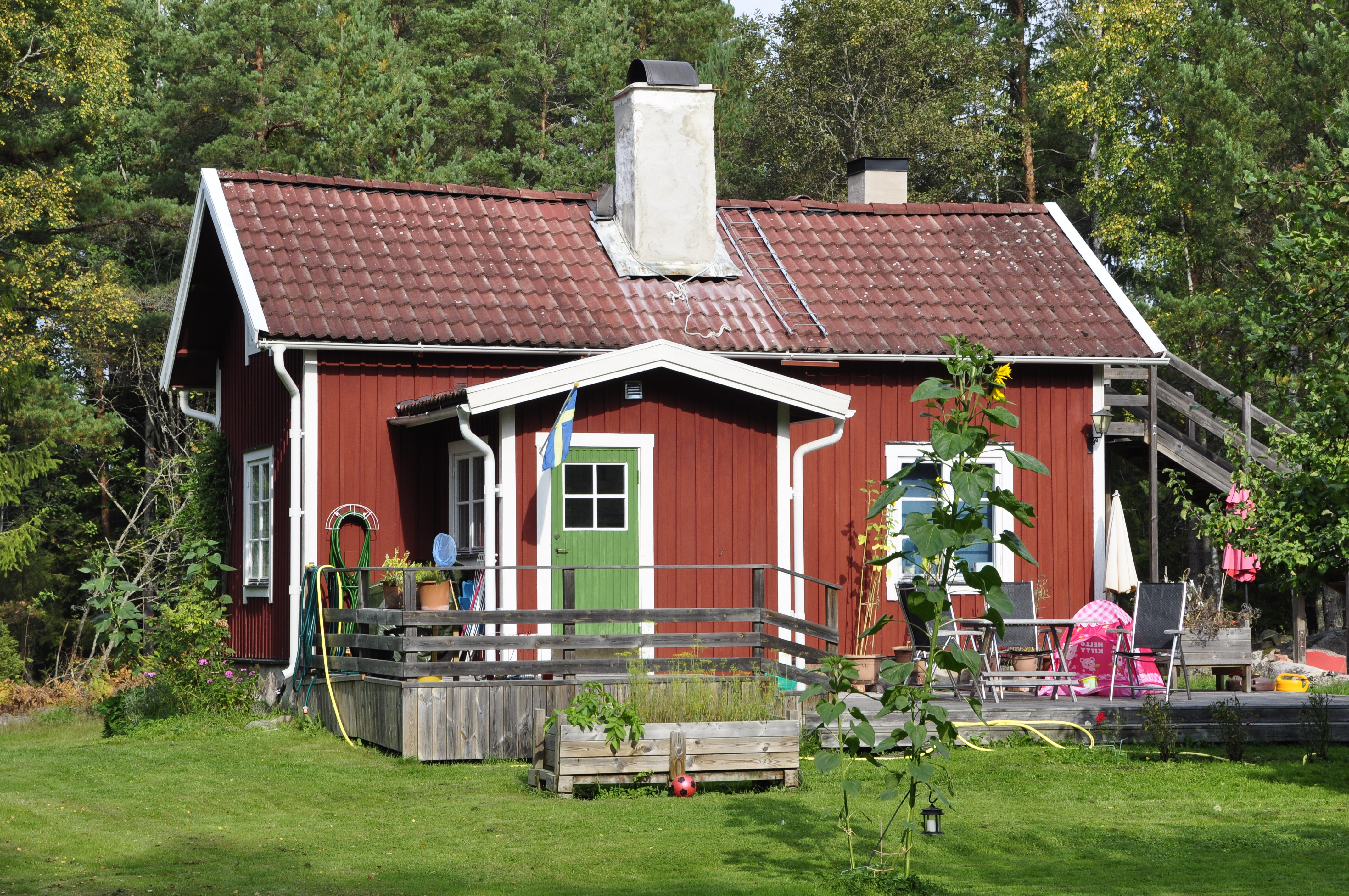 Skogsstugan i Kårboda, Ljusterö